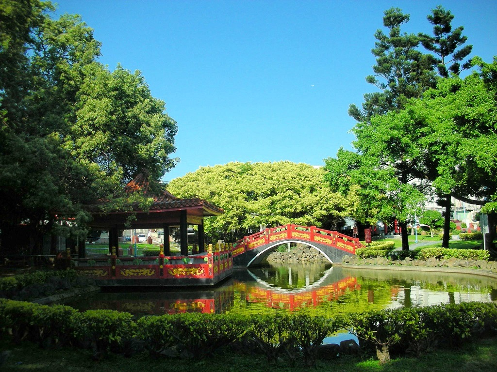 中正公園是位於臺灣桃園市龜山區的一座公園，位於陸光三村、精忠五村旁，自強北路與南崁溪交界處，為龜山區的最早開闢的公園。